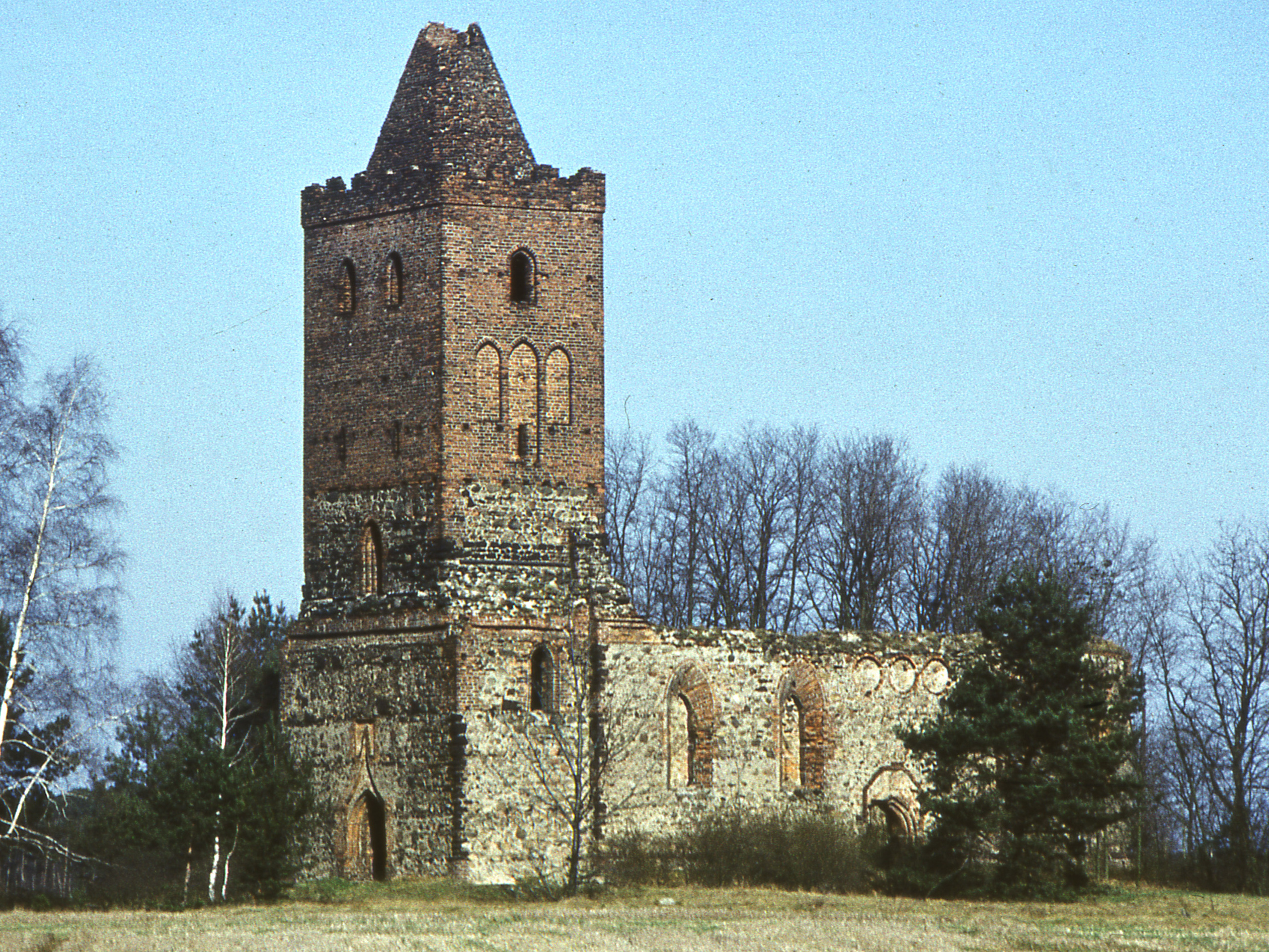 Die ehemalige Wüste Kirche bei Fürstlich-Drehna wurde infolge Beanspruchung des Geländes durch den Tagebau Schlabendorf-Süd am 5. Oktober 1979 (Turm) und am 8. Oktober 1979 (Schiff) gesprengt.